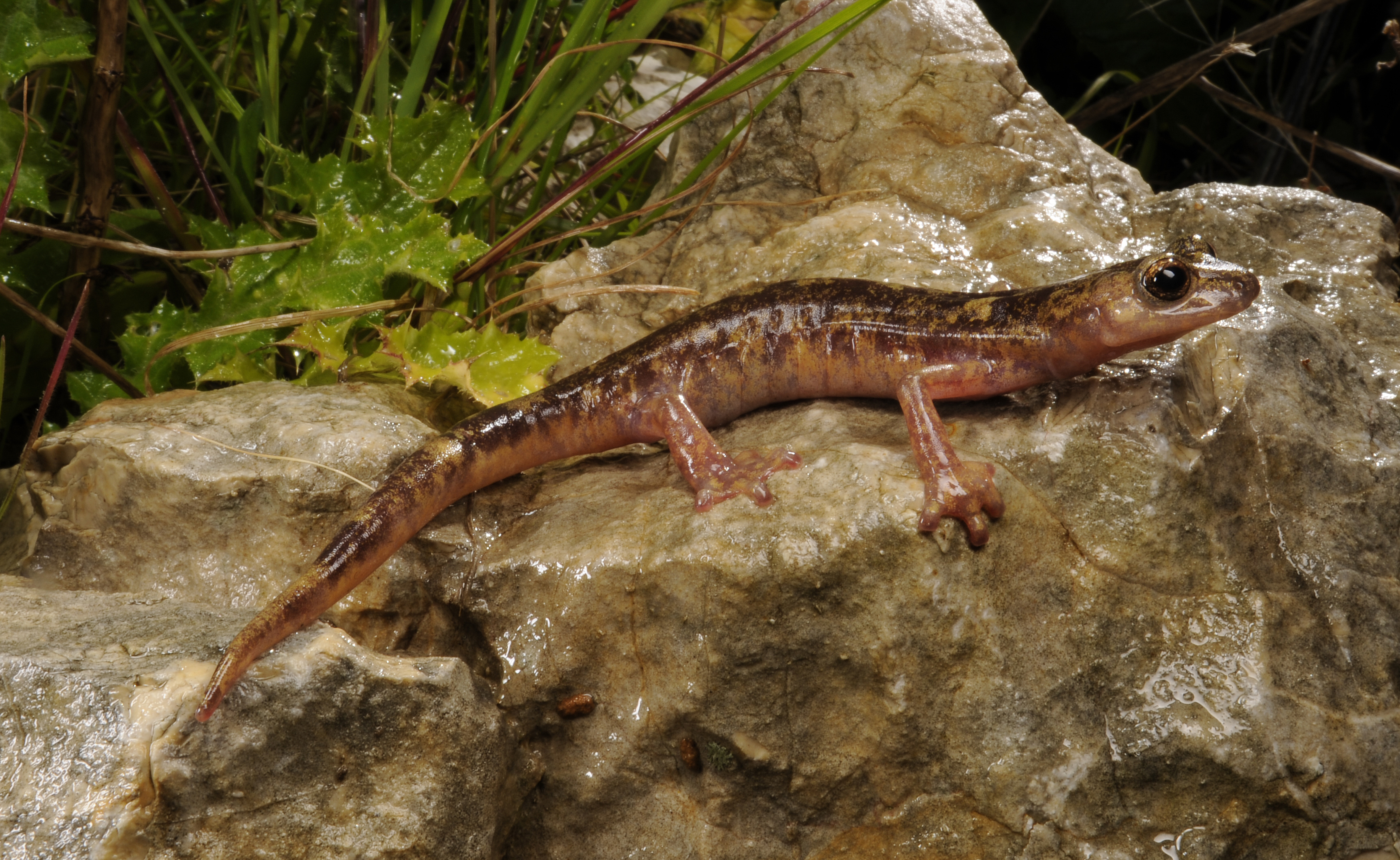 Monte-Albo-Höhlensalamander (Speleomantes flavus) von Sardinien